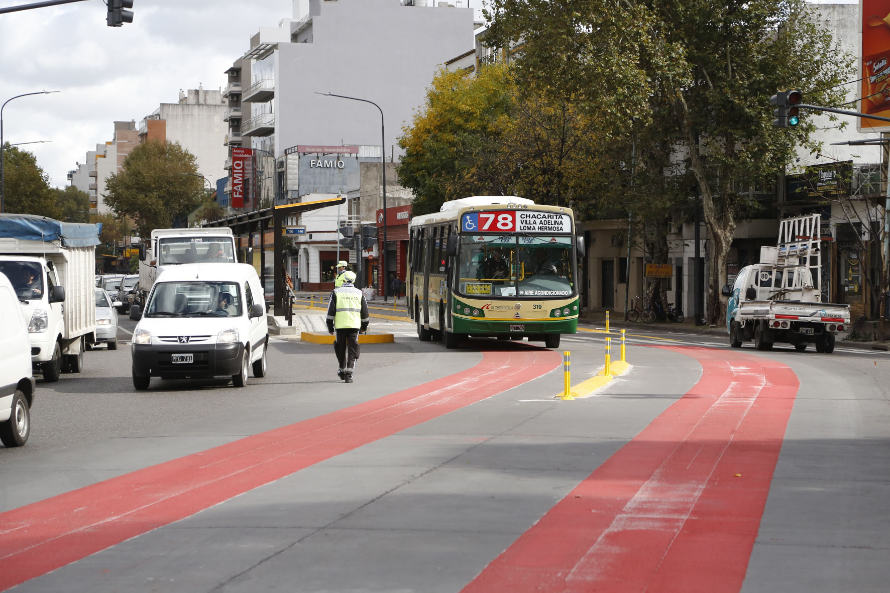 Metrobus sobre la avenida San Martín.